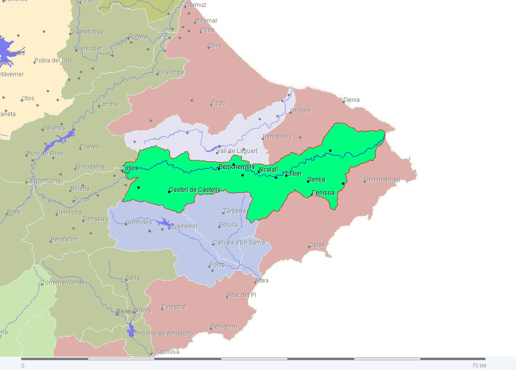 Mapa de la cuenca del río Gorgos Alicante España